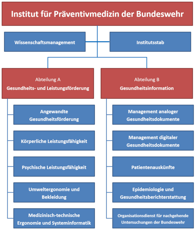 Aktuelle Struktur des Instituts für Präventivmedizin